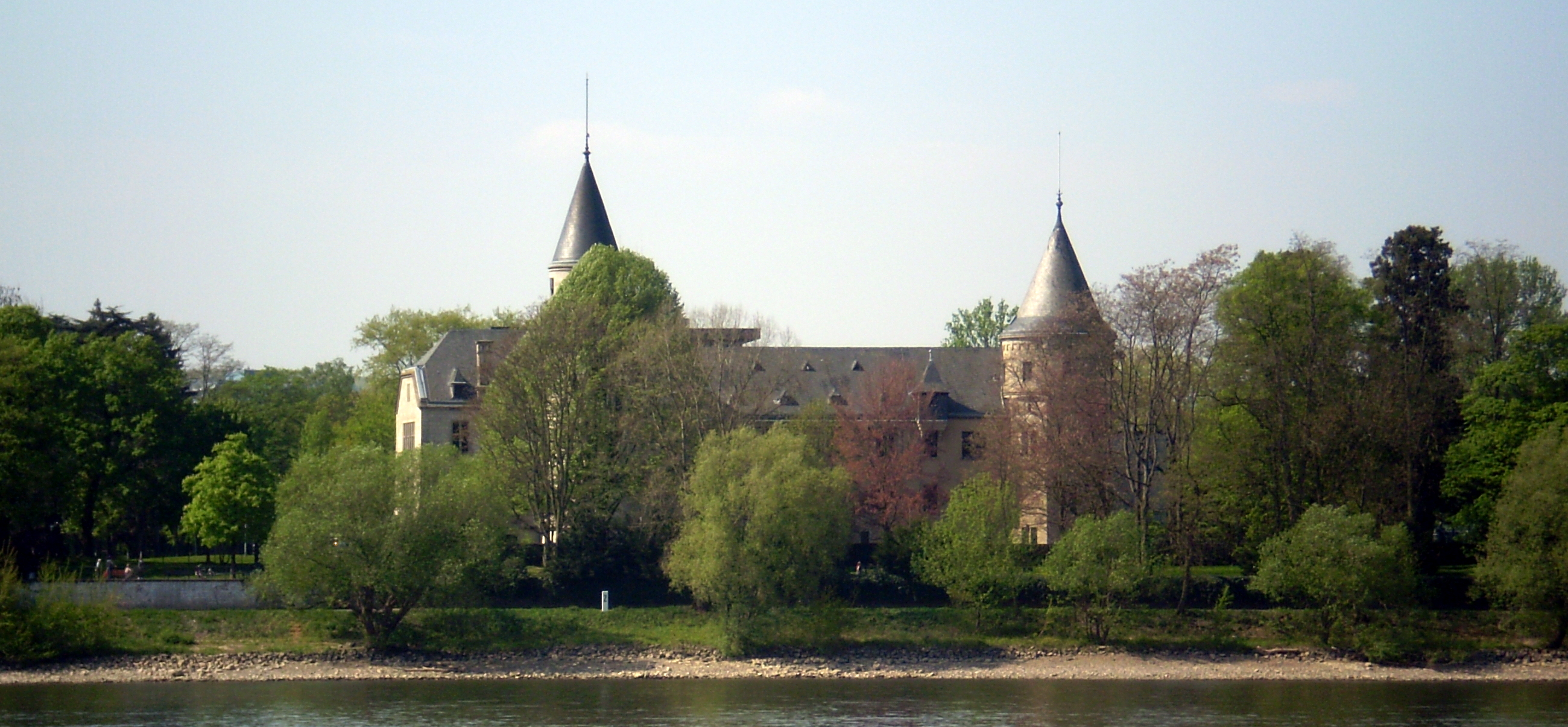 Haus Carstanjen in Plittersdorf, Bad Godesberg: Rheinseite